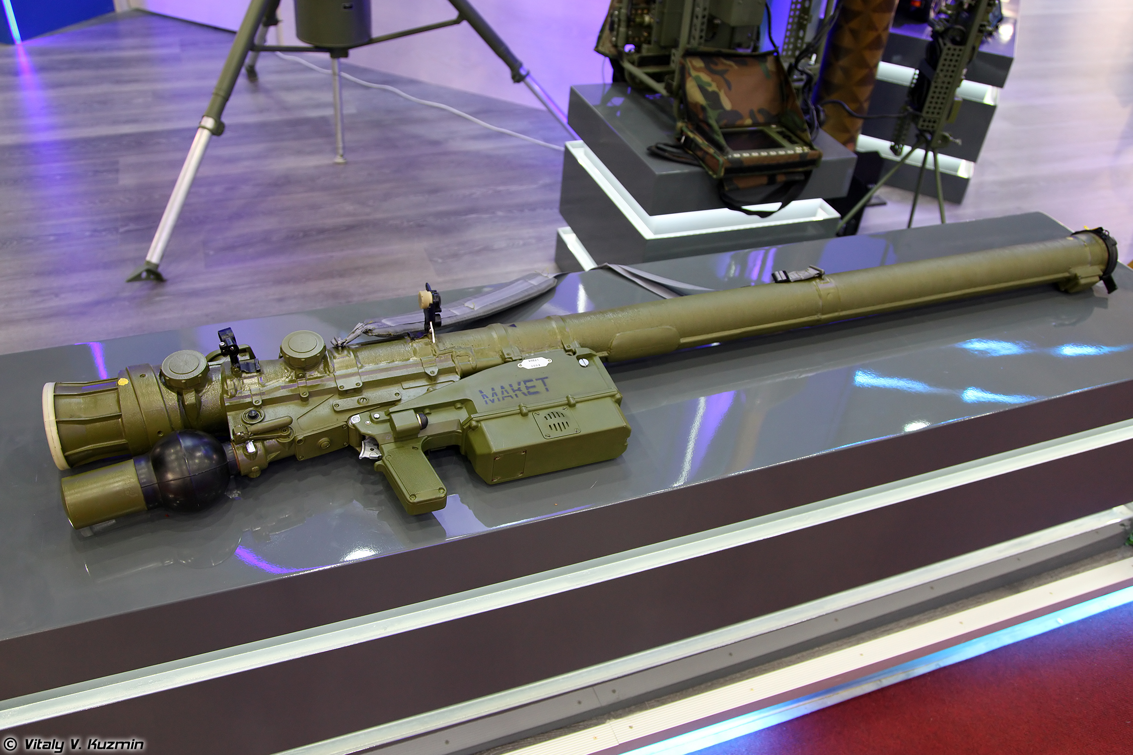 ПЗРК 9К333 Верба